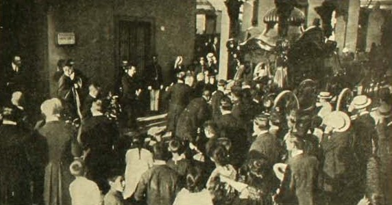 Funerales de la víctima del incendio de la legación alemana, Santiago, Chile.